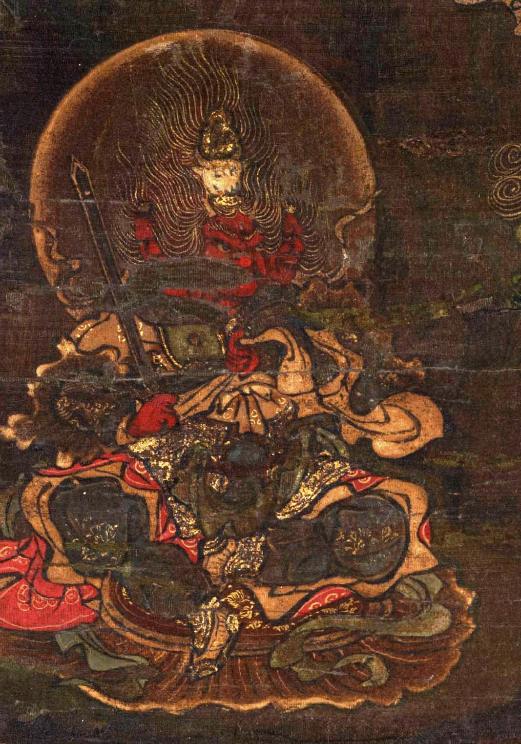 牛頭天王（吉野曼荼羅） 南北朝時代